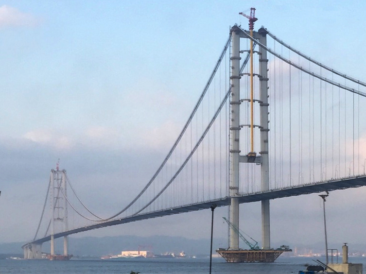 Osman Gazi Köprüsü trenden çekilen görüntü